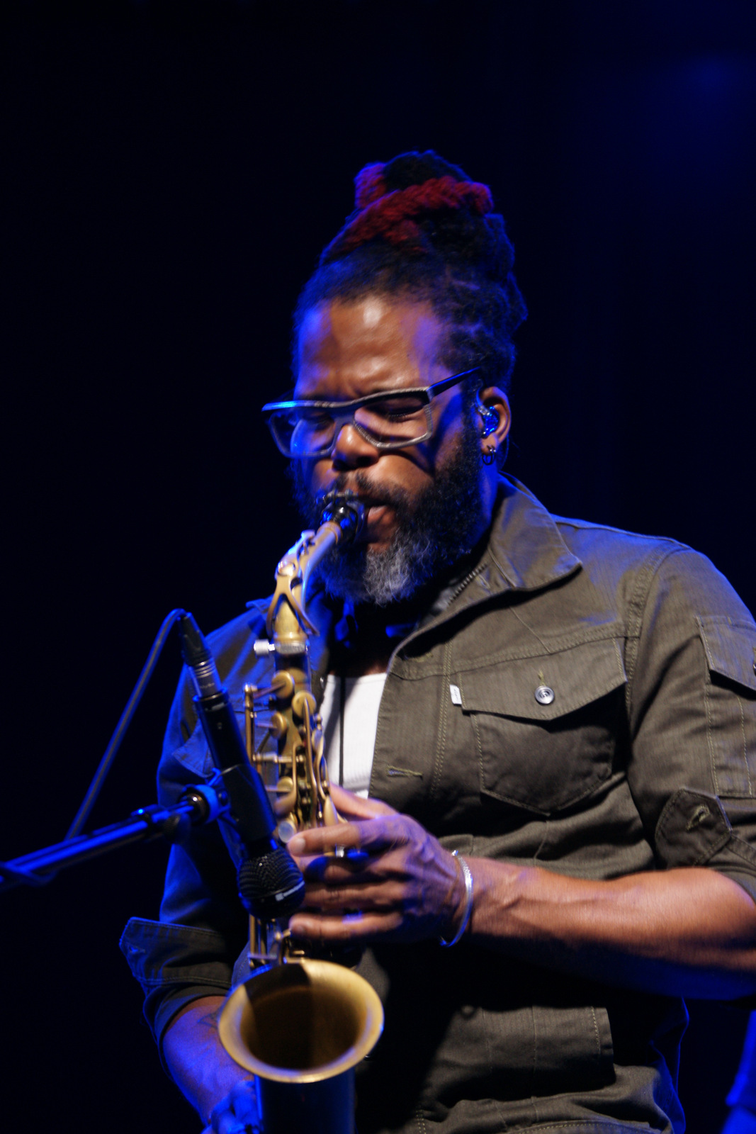 Casey Benjamin Nice 2012